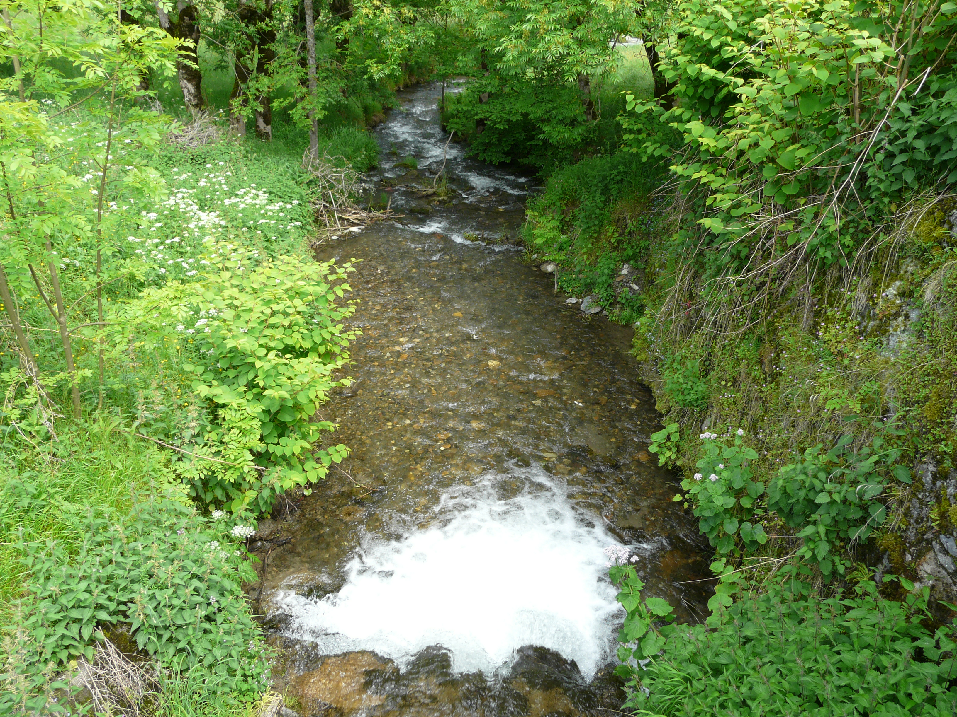 La Neste d'Oueil à l'ouest du village de Cirès, Haute-Garonne, France.Vue prise en direction de l'aval.